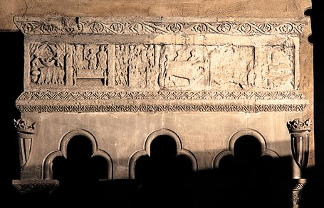 Tomba de Ramon Berenguer III el Gran a Ripoll. Sepulcre del s. XII.